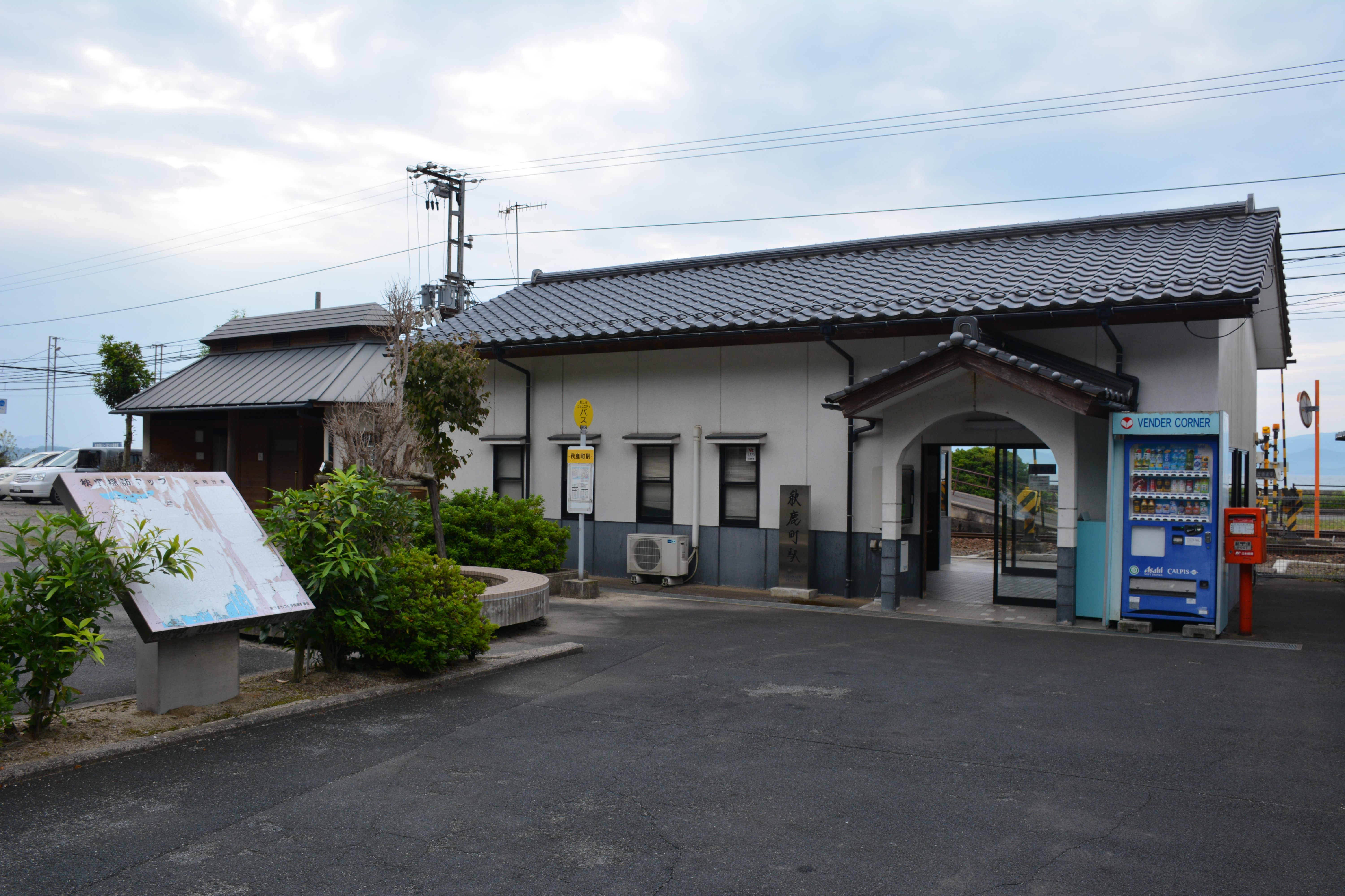 秋鹿町駅